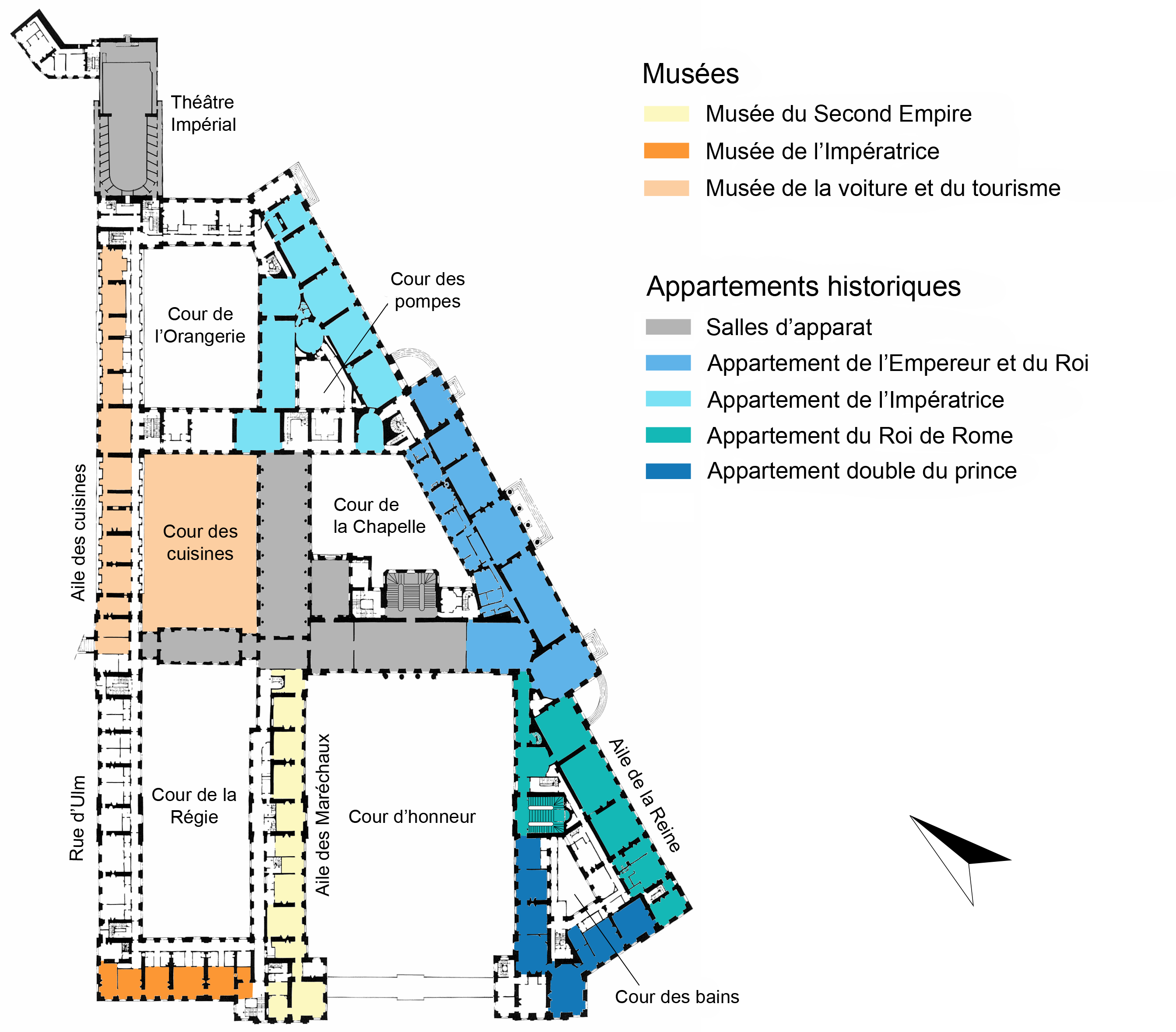 Plan du premier étage du Château de Compiègne